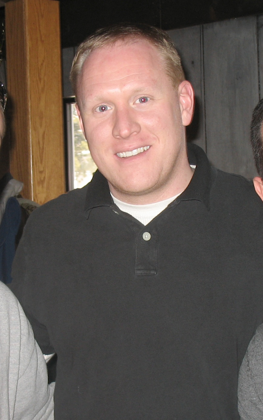 Utah Senator Scott McCoy